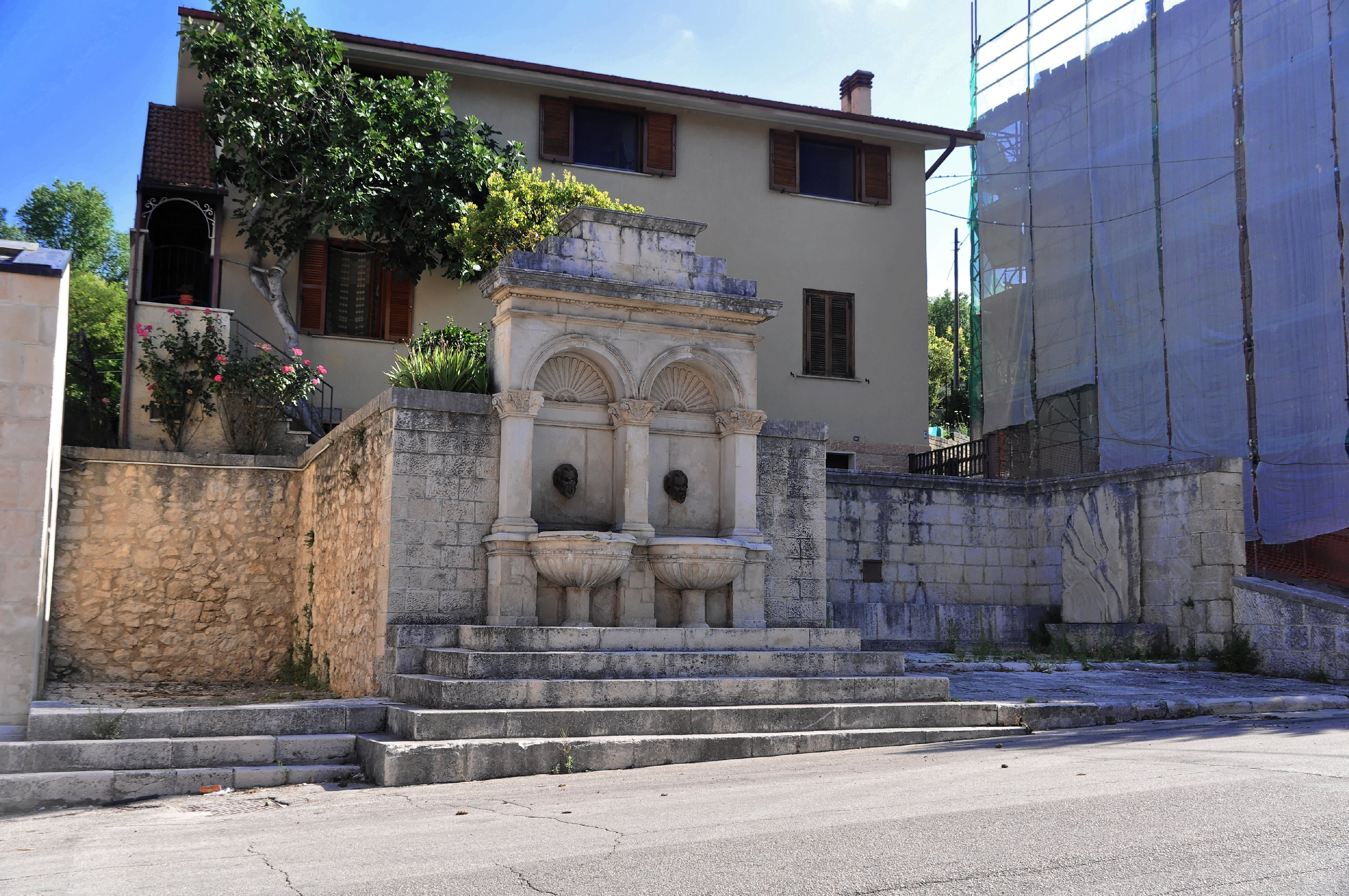 Poggio Picenze 2017